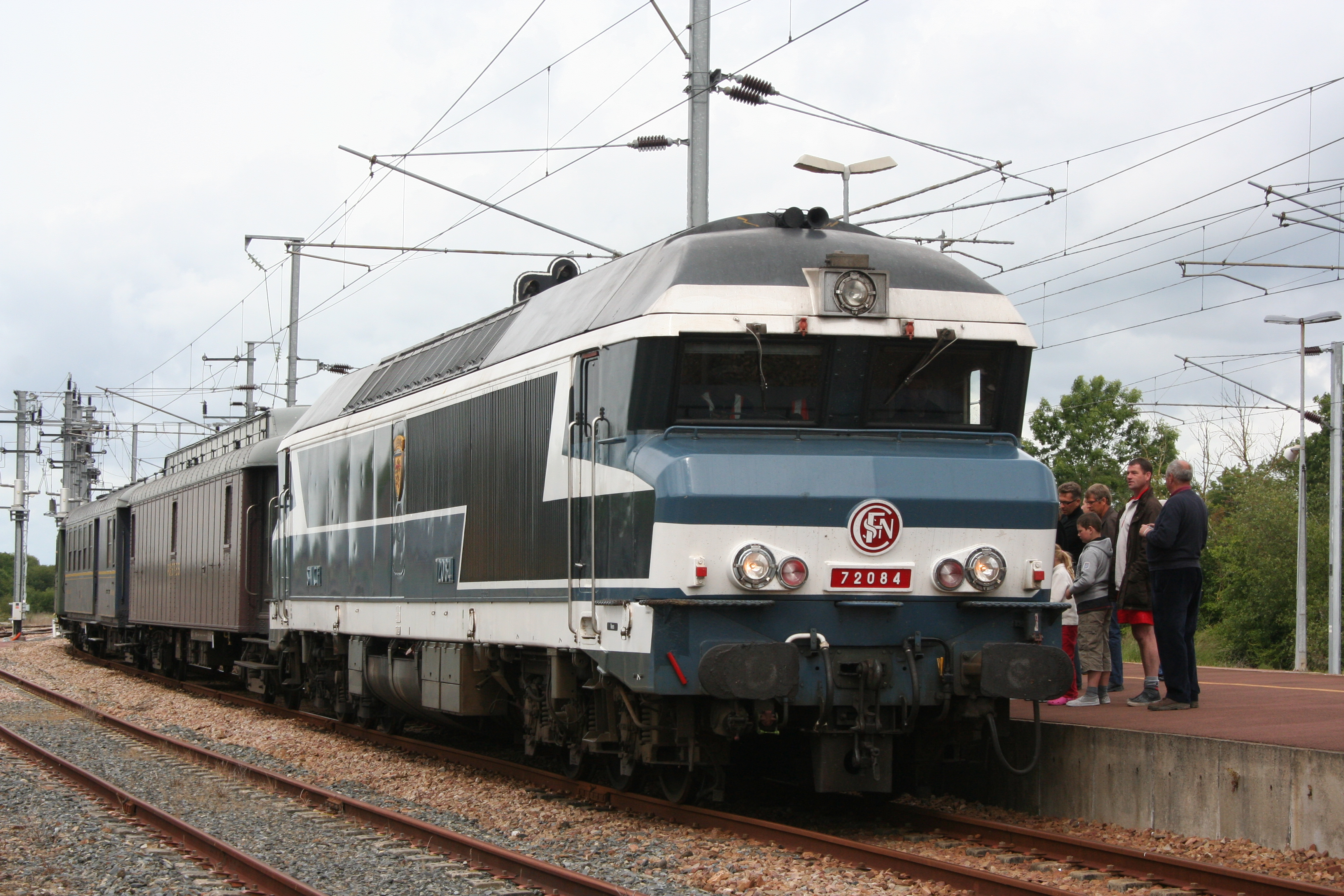 la CC 72084 en gare de Lison